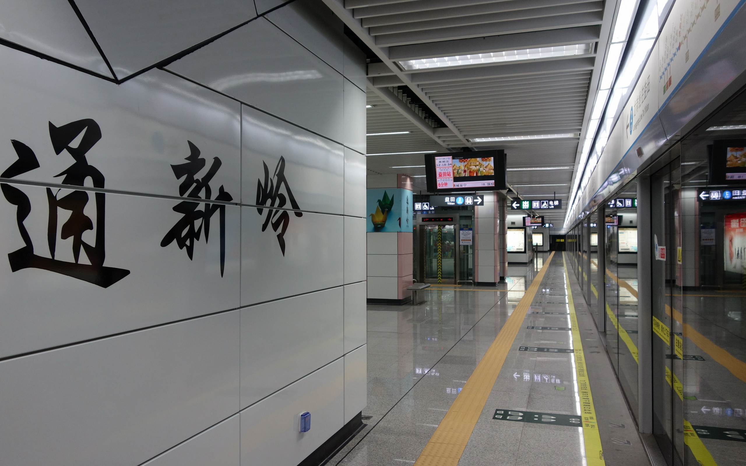 龙岗线通新岭车站站台层